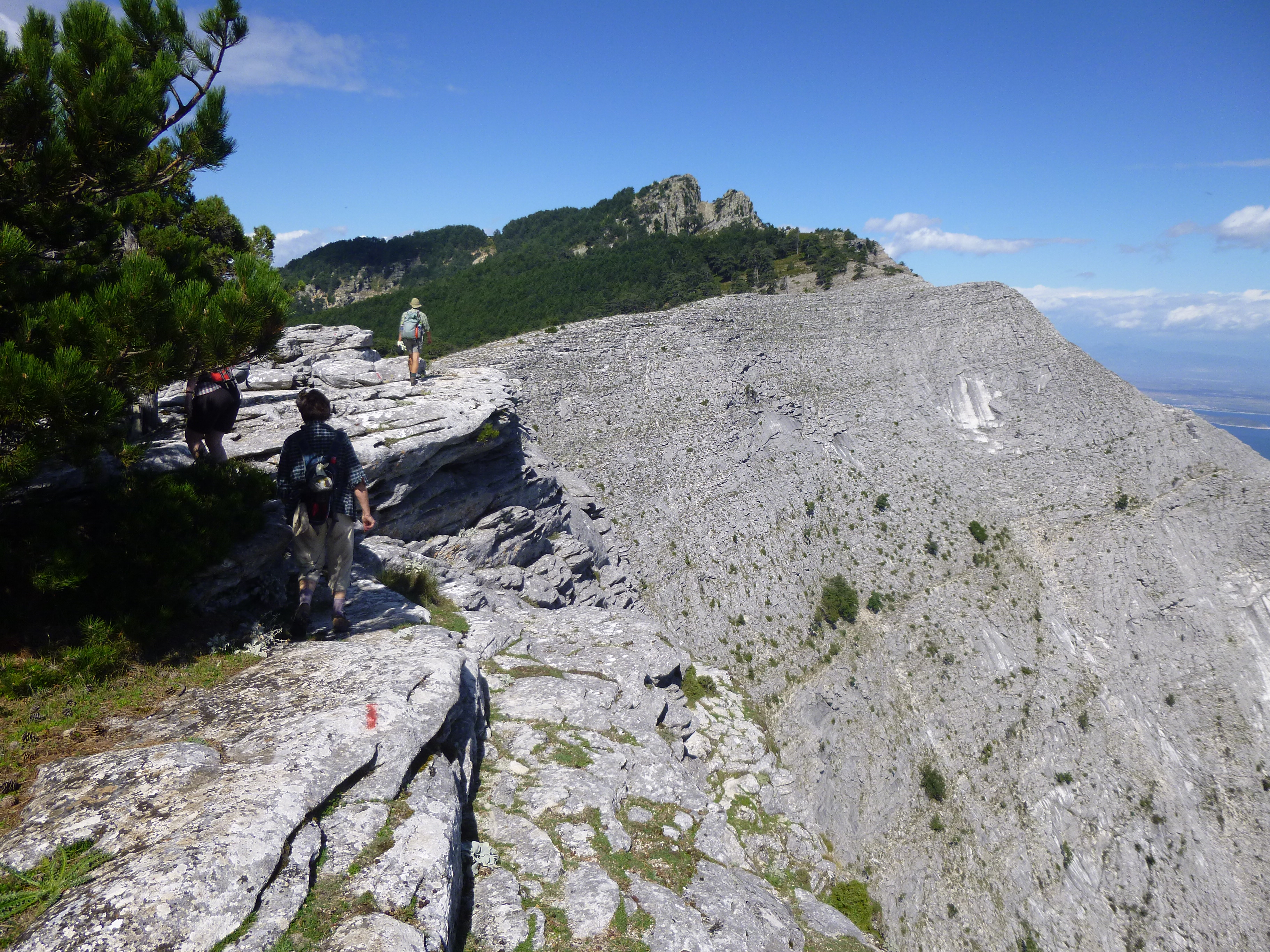 Blick auf den 1.204 m hohen Berggipfel des Ipsarion auf der griechischen Insel Thassos. Anstieg über den Ort Theologos.